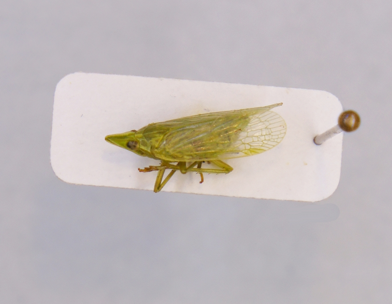 Dictyophara europaea (Linné, 1767) Herkunft: Deutschland, Bayern, Kehlheim